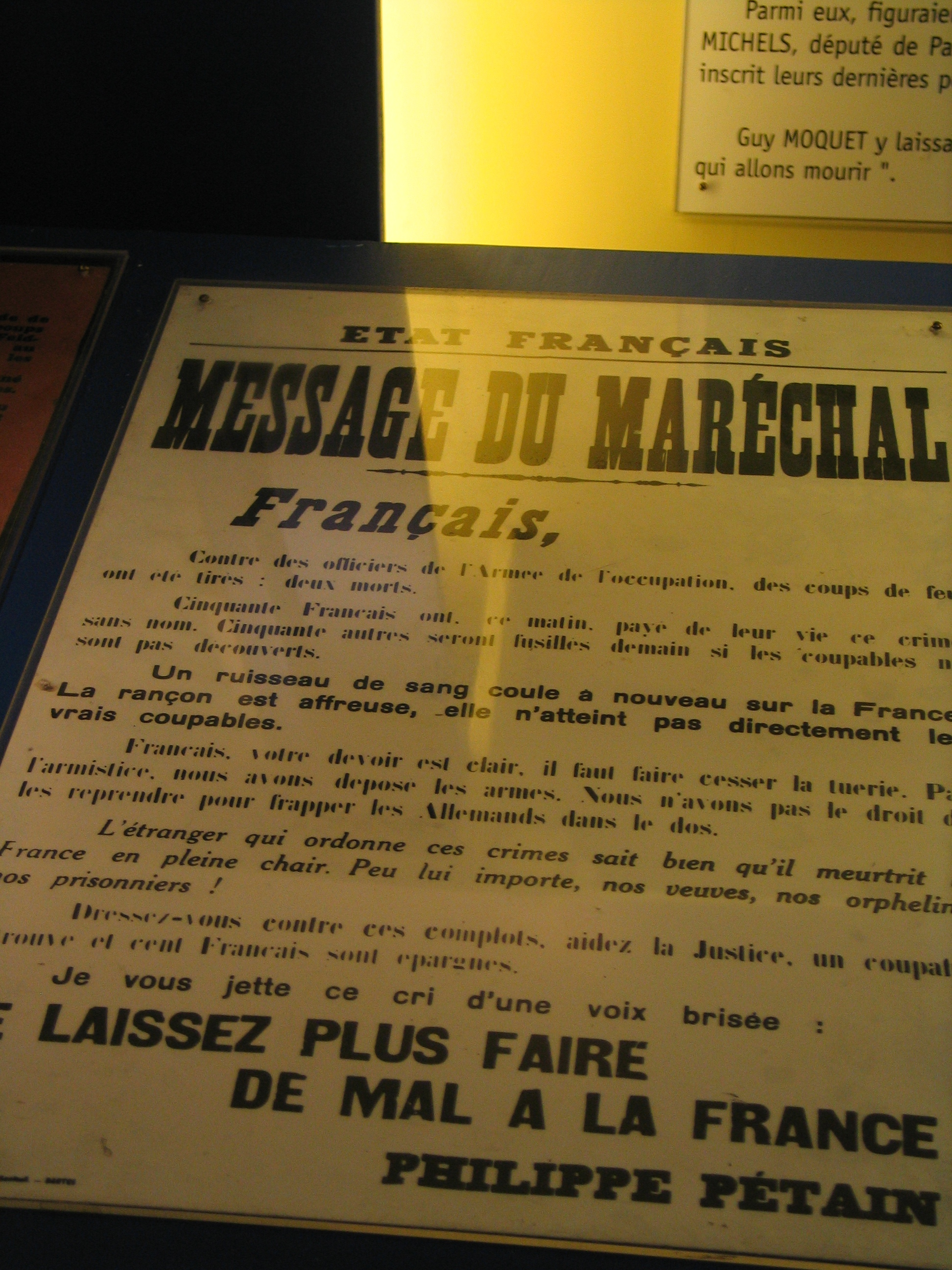 Exposition métro Guy Môquet, Paris